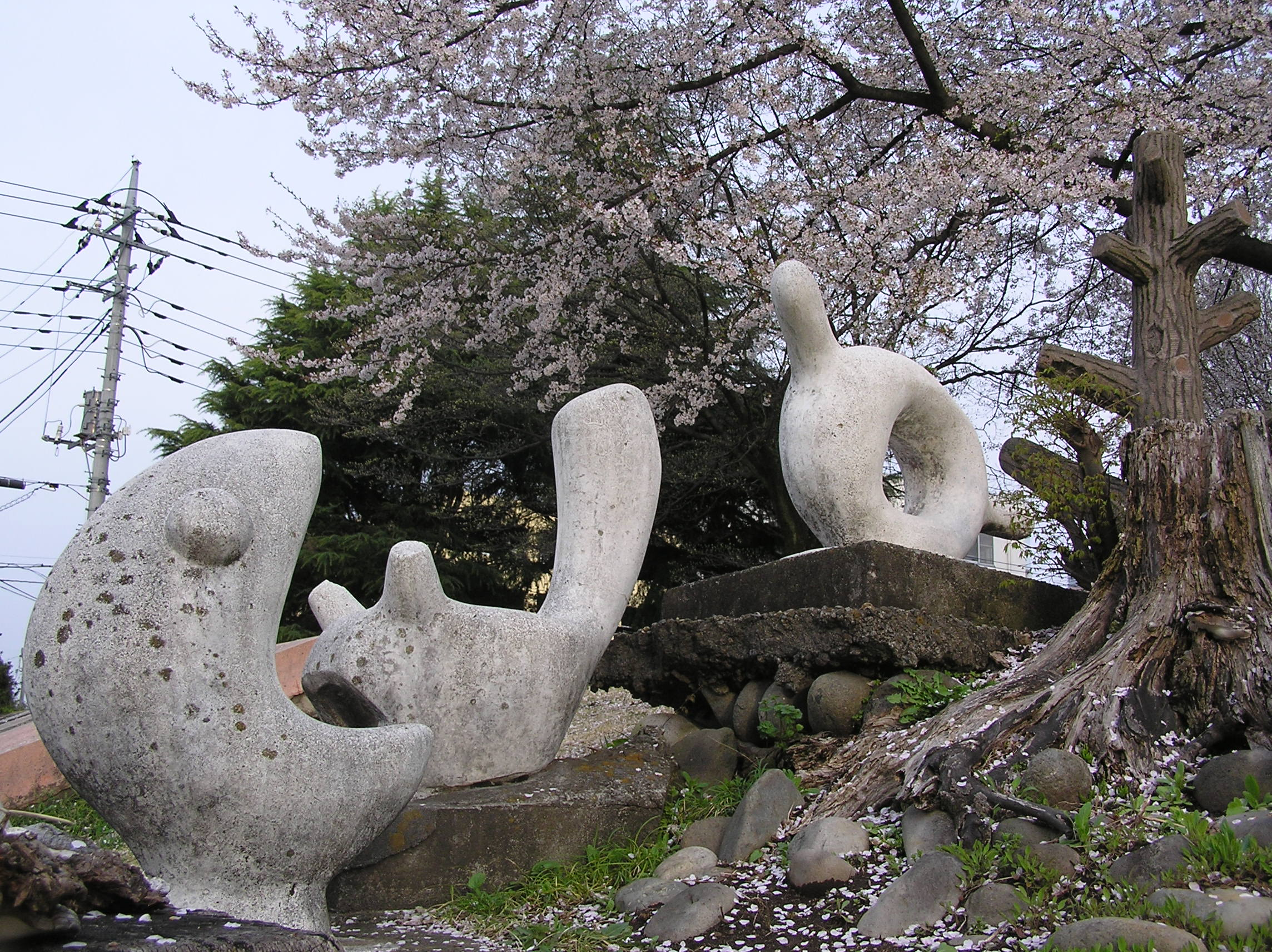 王山公園